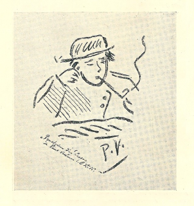 Dessin caricatural de Rimbaud fait par Paul Verlaine vers 1871-72